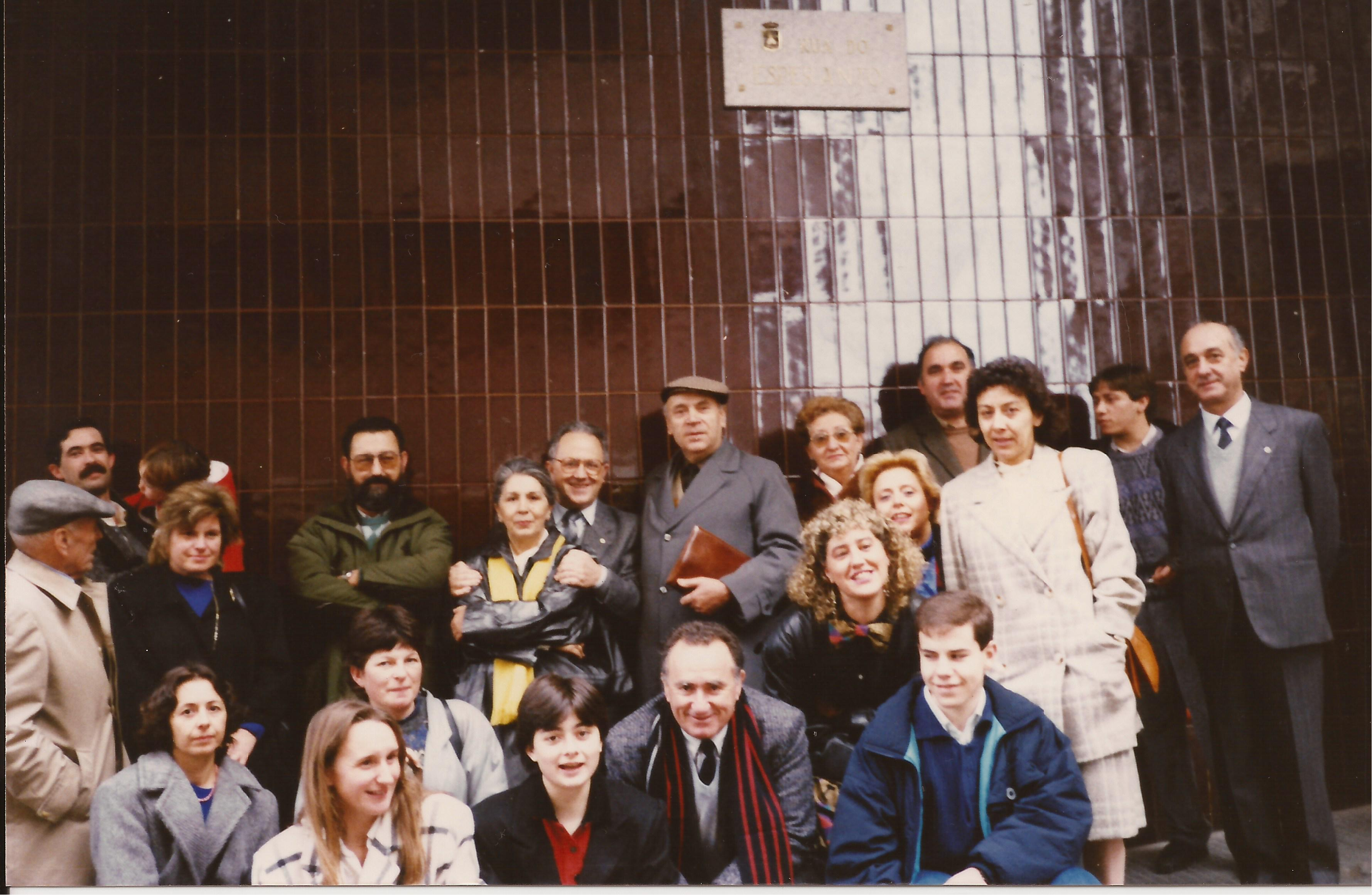 Foto de la solena inaŭguro de la Esperanto-strato en Vigo. Maldekstre, kun ĉapo, la tiama prezidanto de la viga e-grupo Paco kaj Amo, S-ro Xulio Bueno Cortés. Meze, en koltuko, universitata profesoro Xesús Alonso Montero, ĉiama defendanto de esperanto.